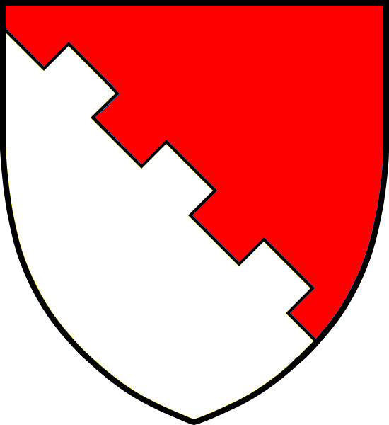 Vapensköld för danska adelsätten Reventlow